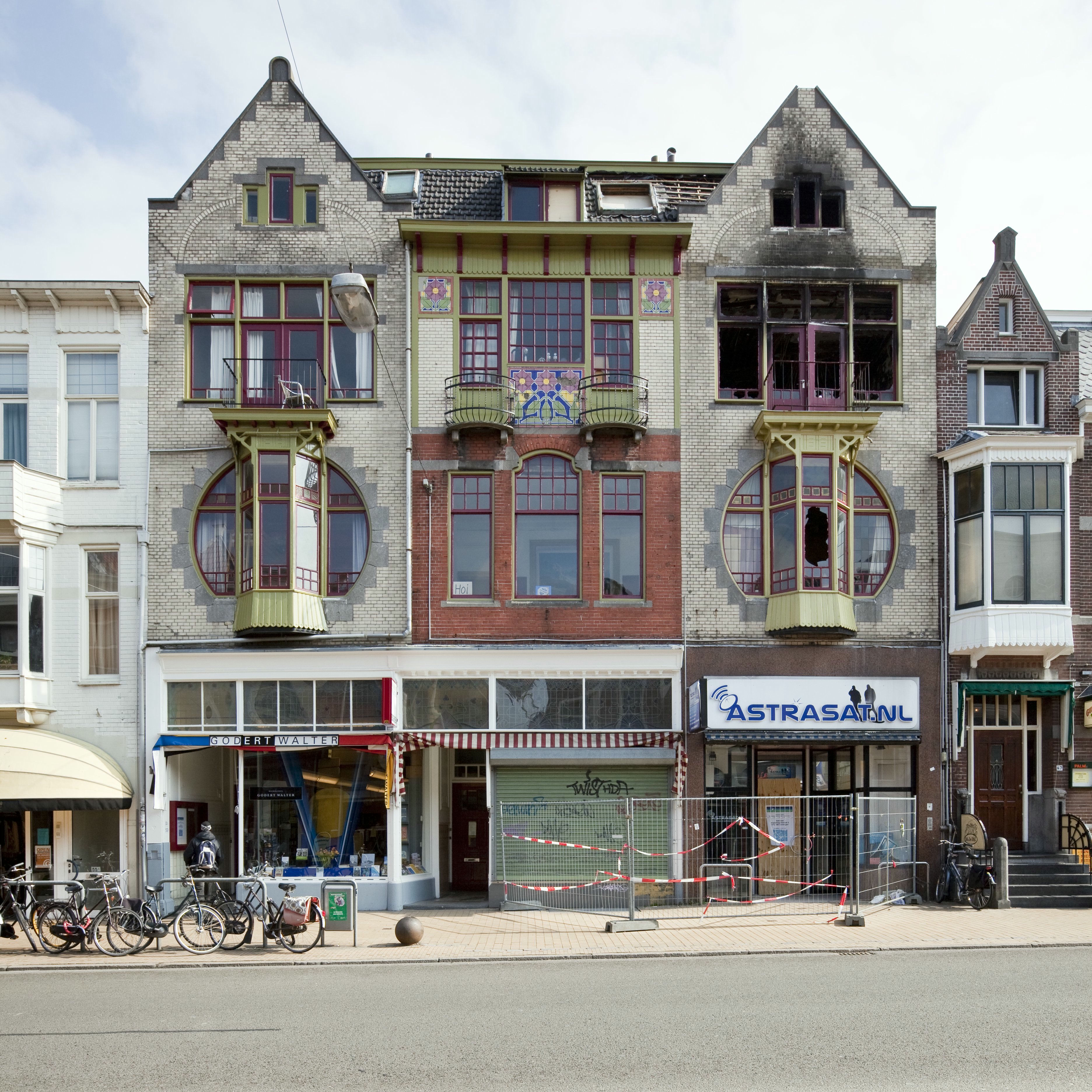 Jugendstil/ Brand: Overzicht voorgevel, na brand